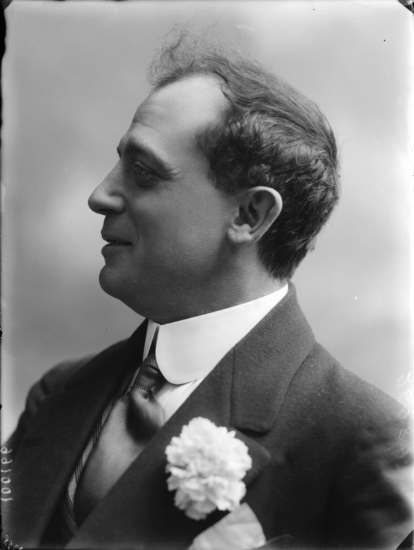 Leopoldo Fregoli